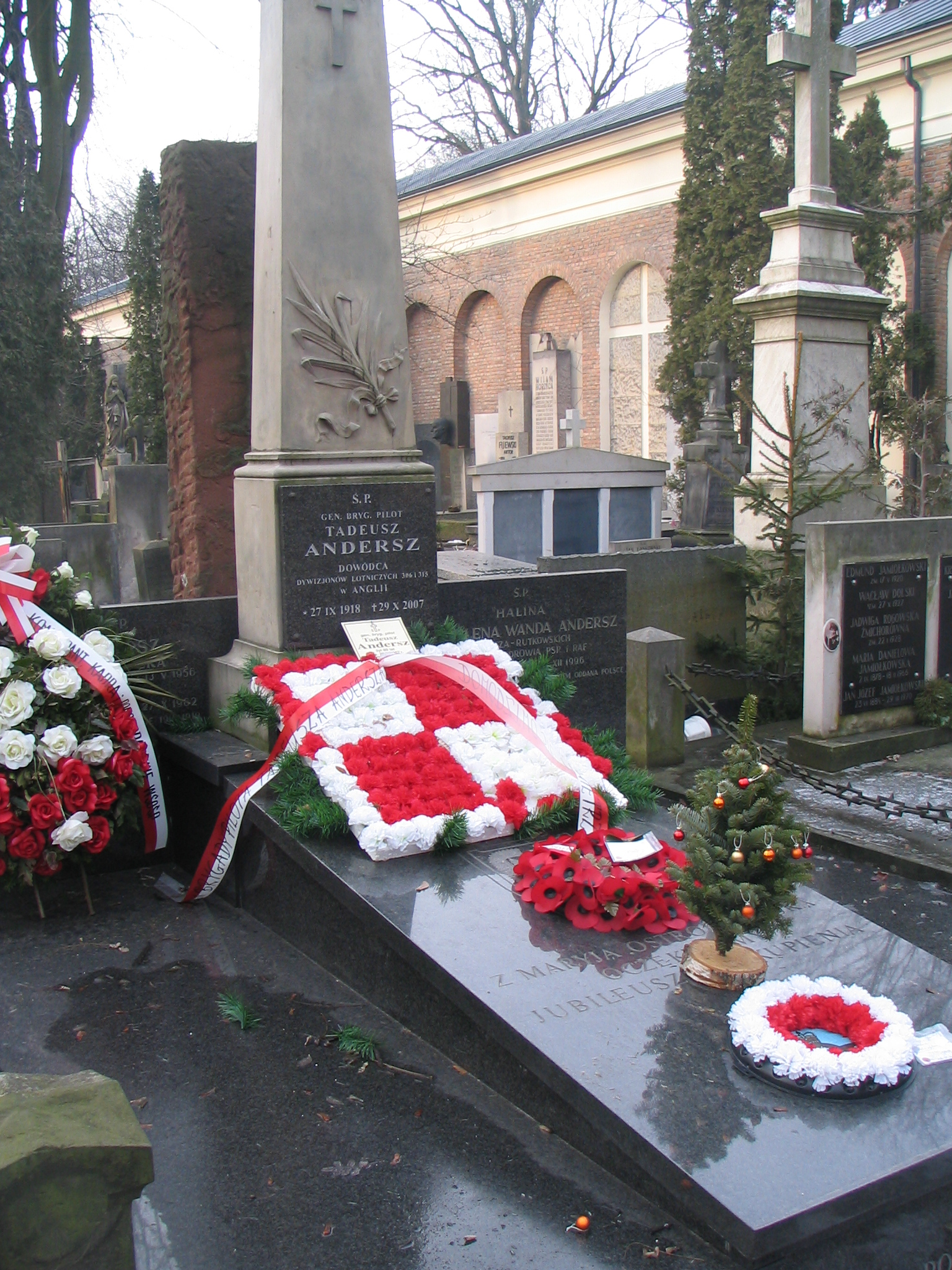 Nagrobek Tadeusza Andersza, Cmentarz Powązkowski w Warszawie